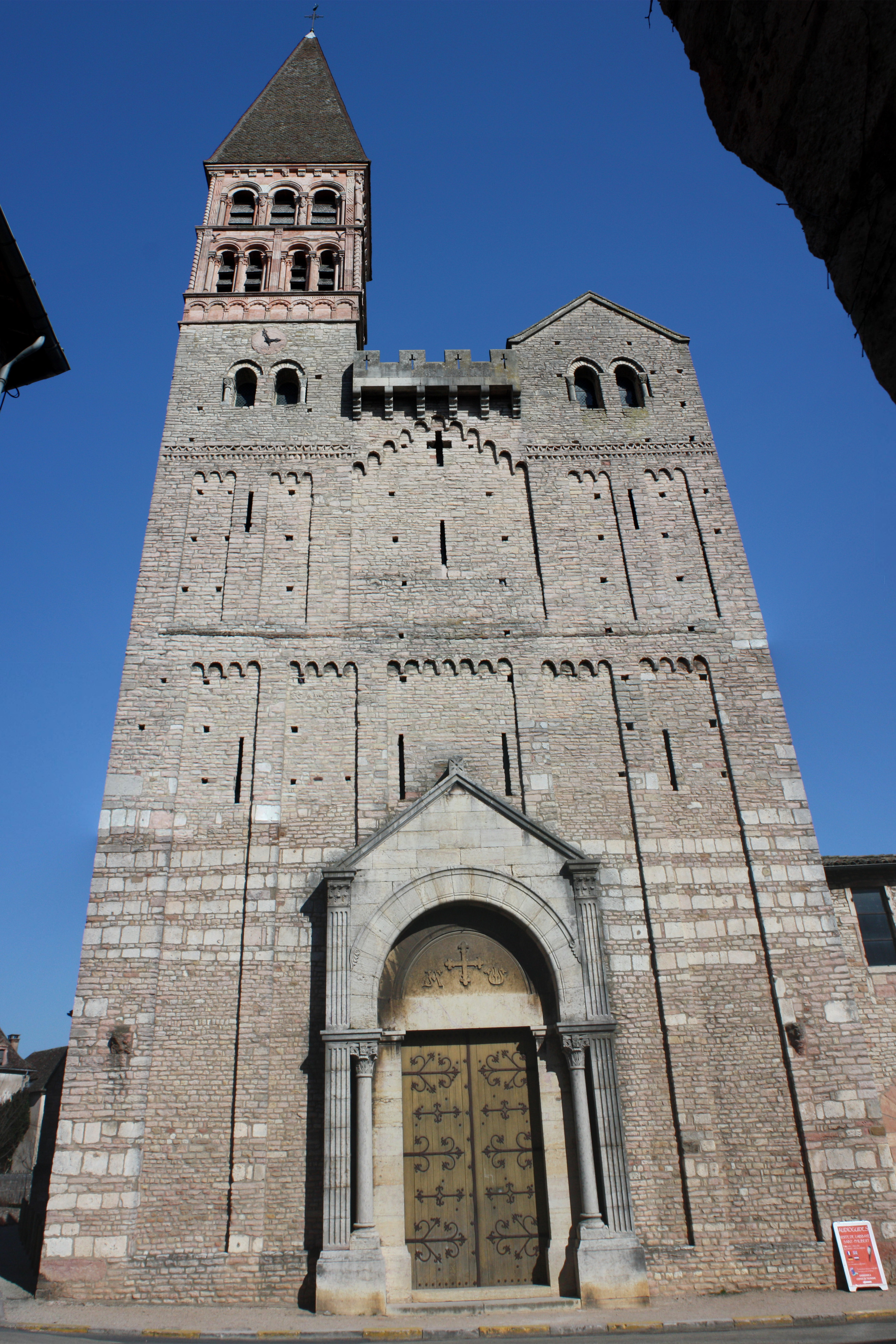 Dans les églises de la région qui sont bâties sur le modèle de Cluny : Autun, Paray-le-Monial, le narthex est toujours séparé de la nef, car il pouvait constituer une ligne de défense suffisante pour dissuader les bandes de brigands en période de trouble. Cela explique l'étroitesse des portes d'accès, à l'intérieur.